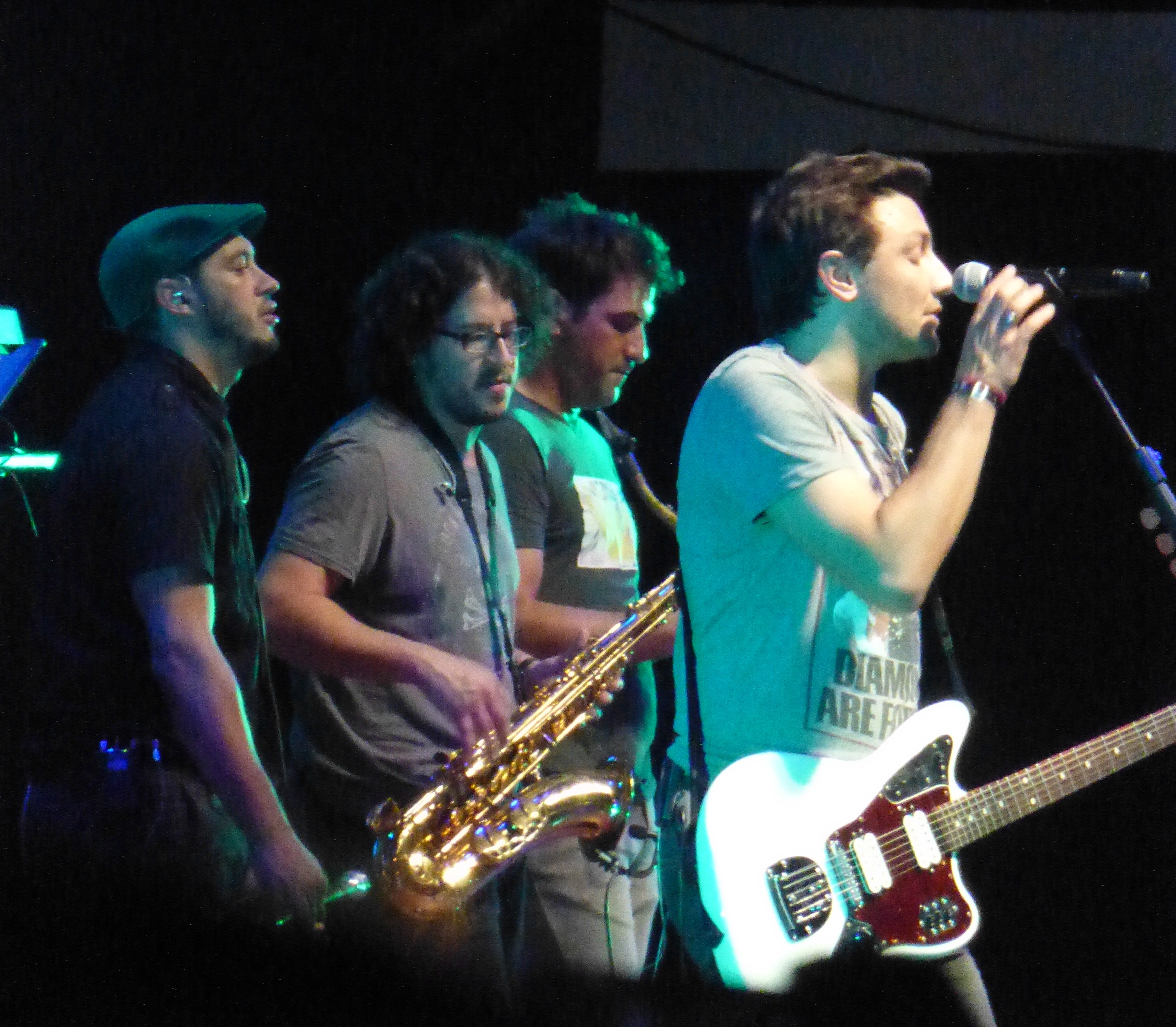 Concierto de No Te Va Gustar (NTVG) durante la XXXIV Fiesta Nacional del Inmigrante en la ciudad de Oberá, Misiones. Agradecimiento a la Federación de Colectividades por la gentileza de acreditar a Wikimedia Argentina como medio de prensa durante la realización de la Fiesta del Inmigrante.